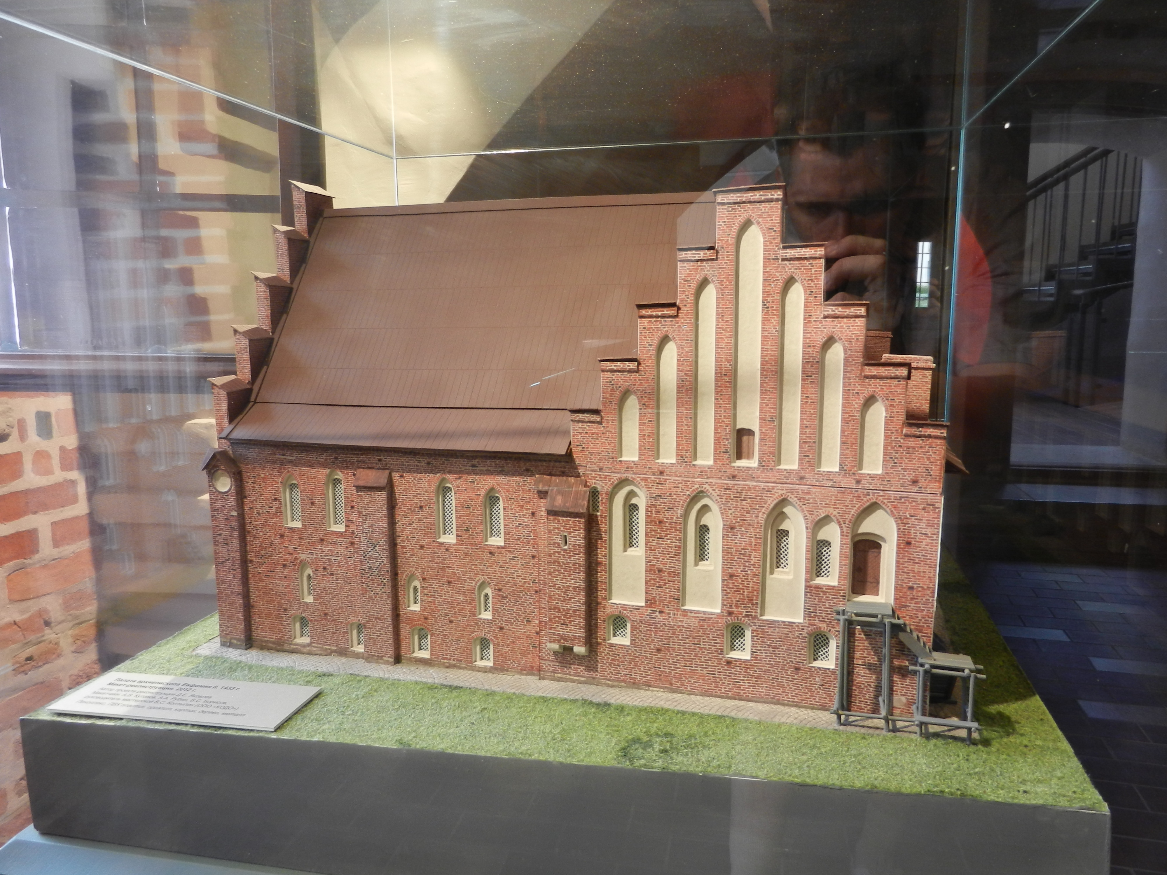 Макет Владычной палаты (реконструкция на XV век)